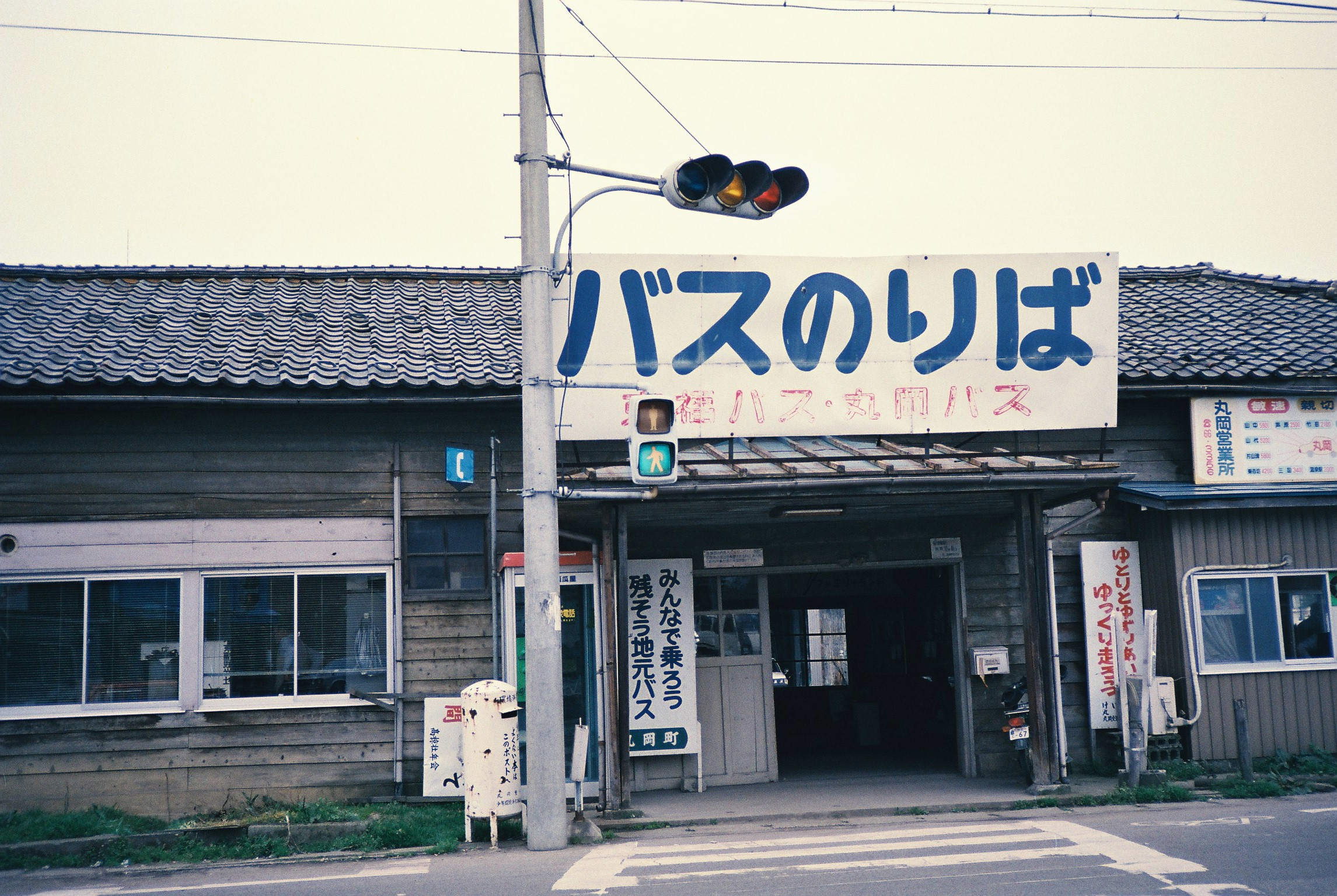 旧・本丸岡駅舎（バスターミナルとして使用していた当時、1987年4月撮影）